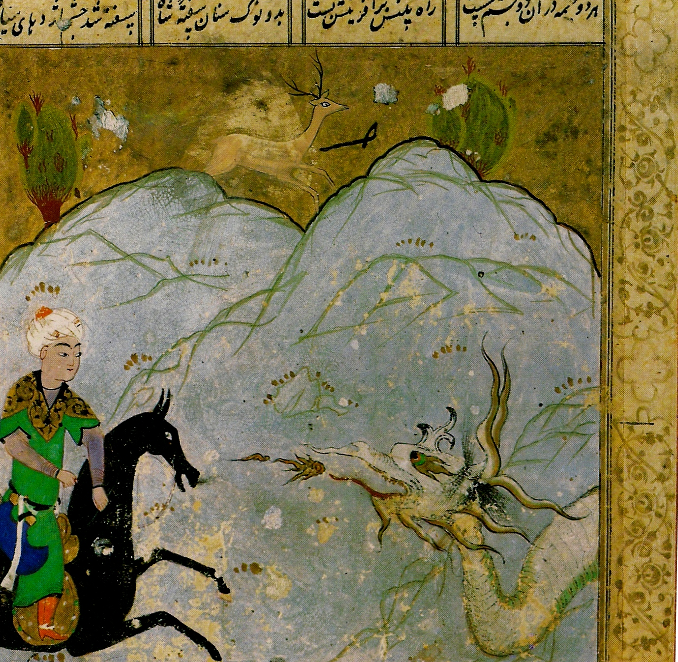 Miniature: Bəhram Gur əjdahanı öldürür. Nizami Ganjavi, Seven Beauties.